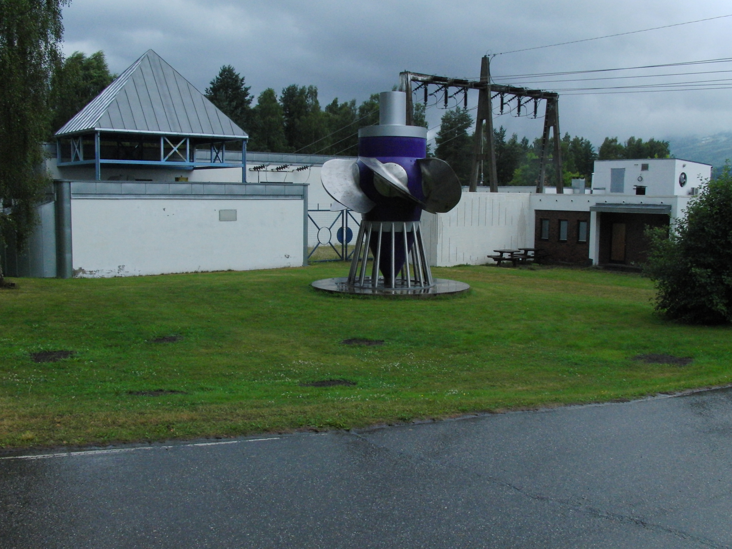 Hunderfossen kraftverk, bygninger